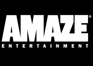 Producent gier komputerowych